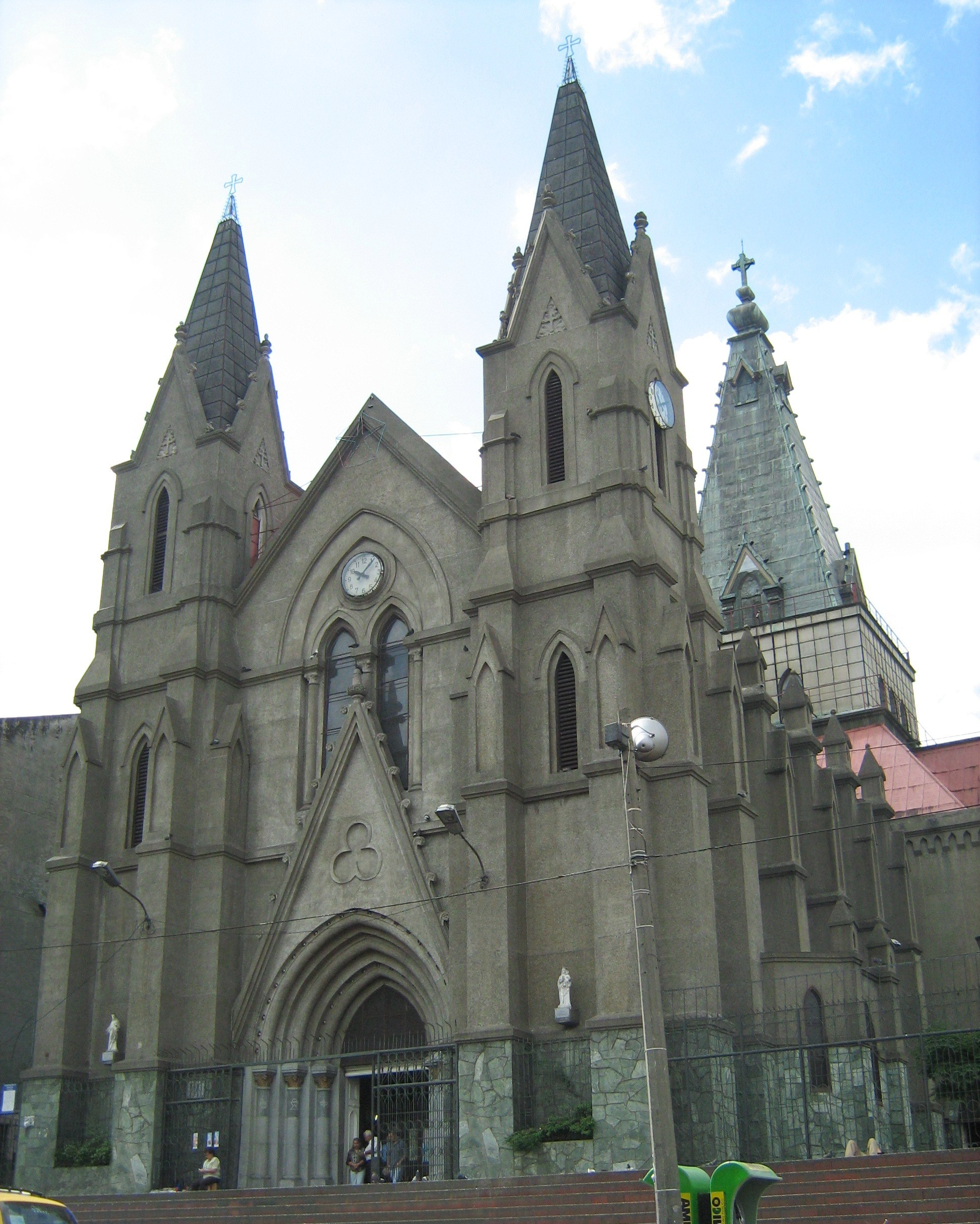 Iglesia de Nuestra Señora del Sagrado Corazón, Medellín, Colombia